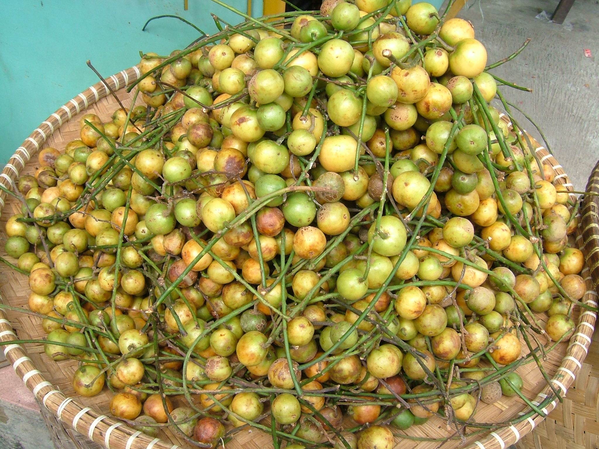 Kepundung (Menteng) Baccaurea racemosa Muell. Arg. カープンドゥン